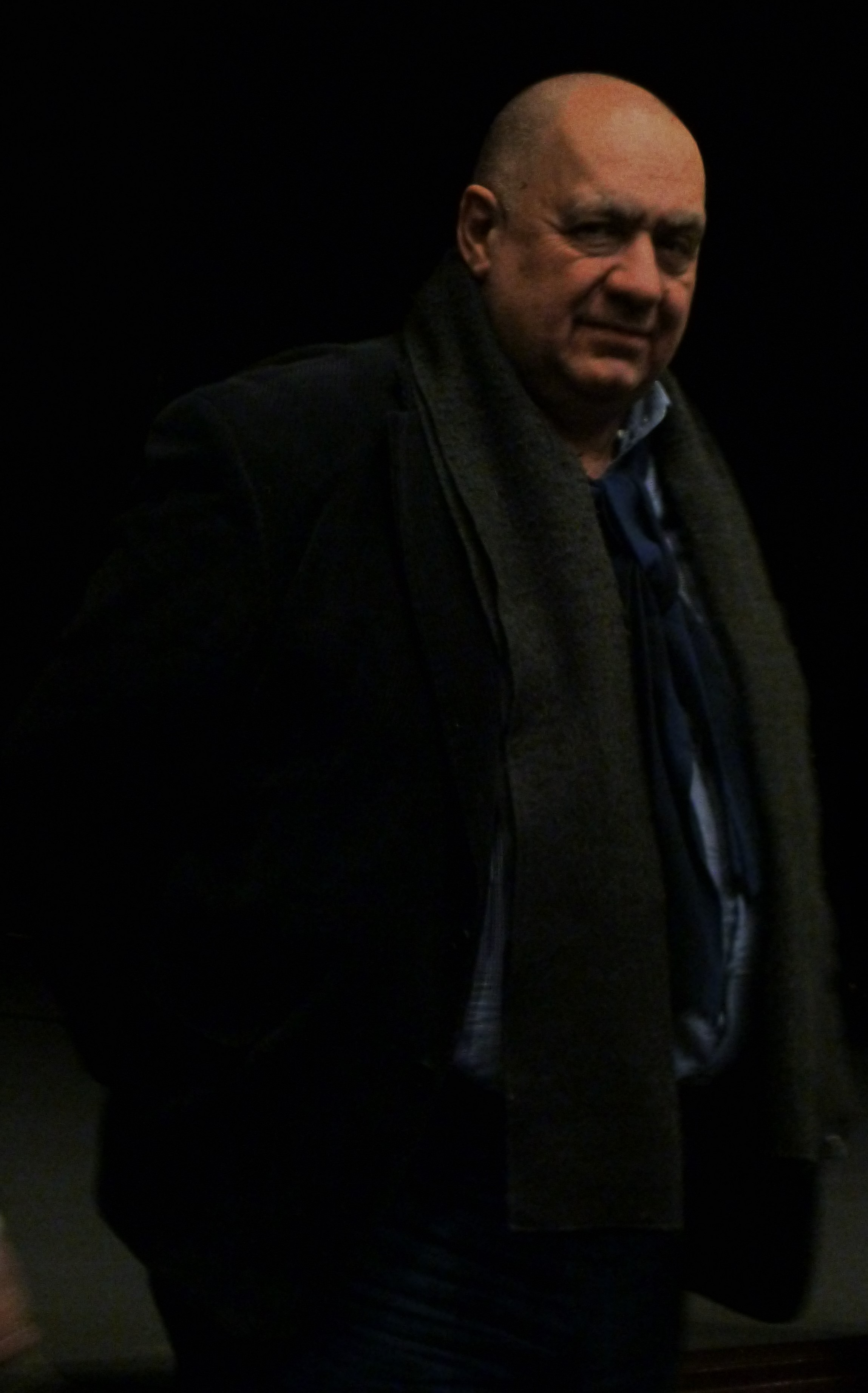 Марчелло Дзеппи, президент фестиваля MISFF, Монтекатини, в Ельцин-центре 3 декабря 2019 года